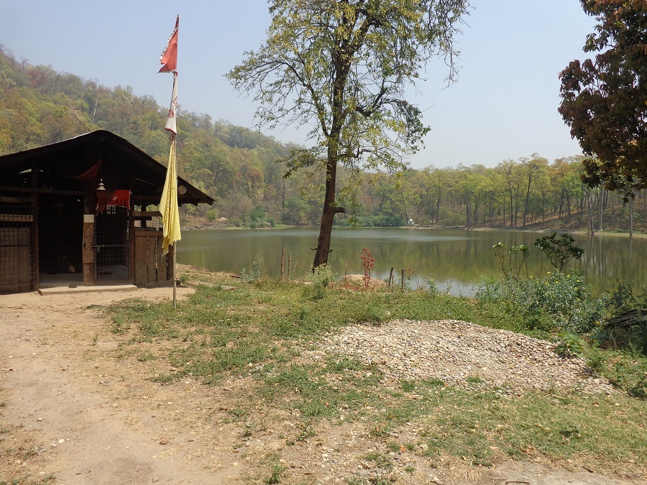 नेपाल भाषा: Bedkot area